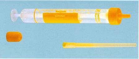 U-S-Monovette, neutral